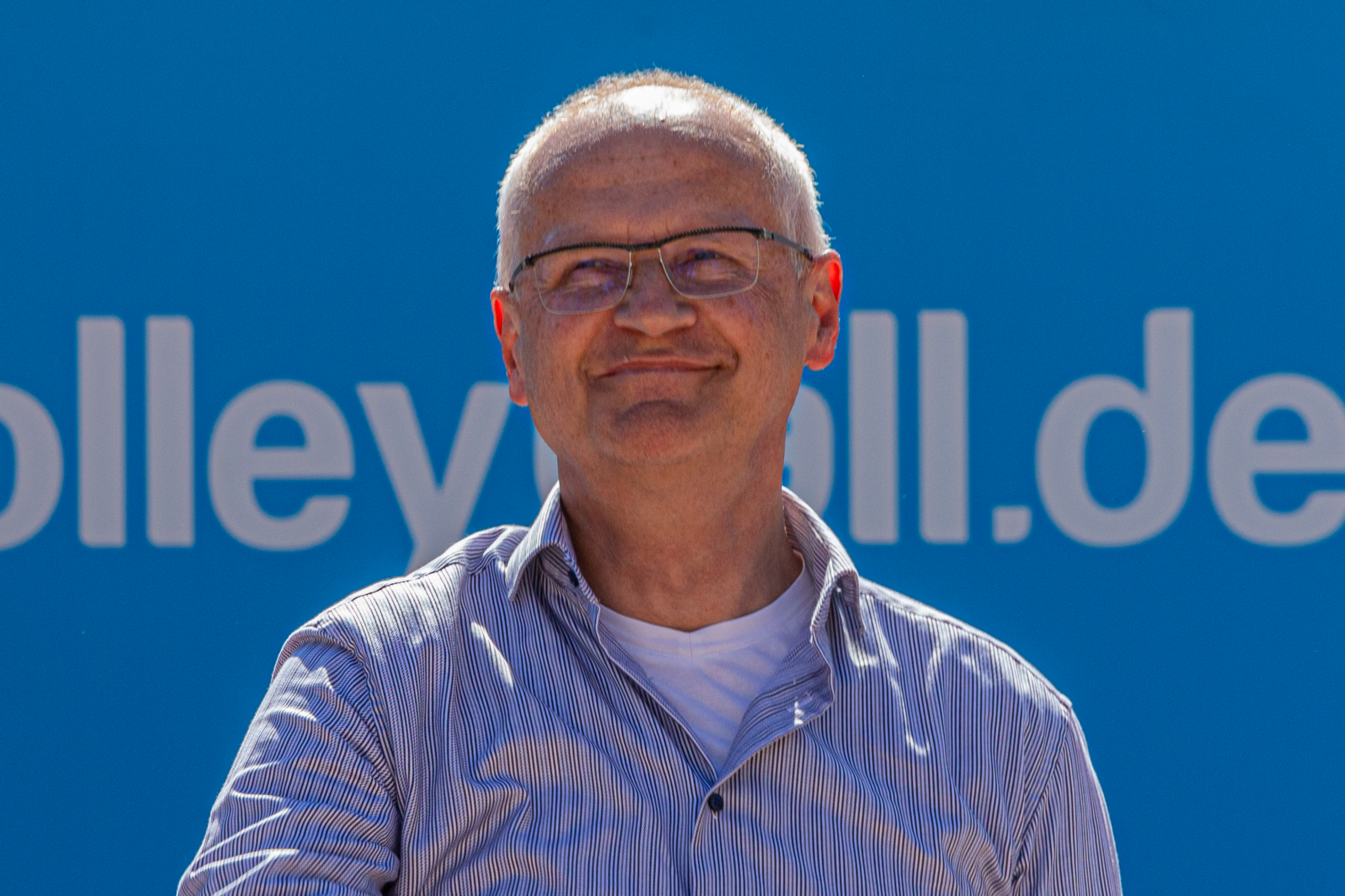 BeachVolleyball, Die Techniker beach tour Nürnberg; Klemens Gsell, dritter Bürgermeister der Stadt Nürnberg; Porträt, Einzelbild